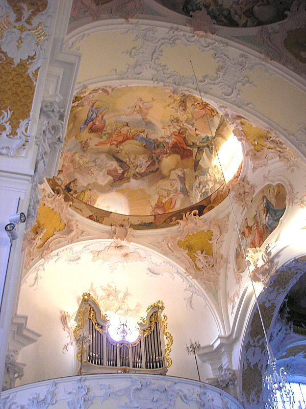 Wallfahrtskirche Herrgottsruh (Friedberg, Landkreis Aichach Friedberg, Bayerisch-Schwaben). Eigene Aufnahme, Nov. 2006 / Pilgrimage church "Herrgottsruh" (Friedberg, Bavaria, Germany). Own photo, Nov. 2006